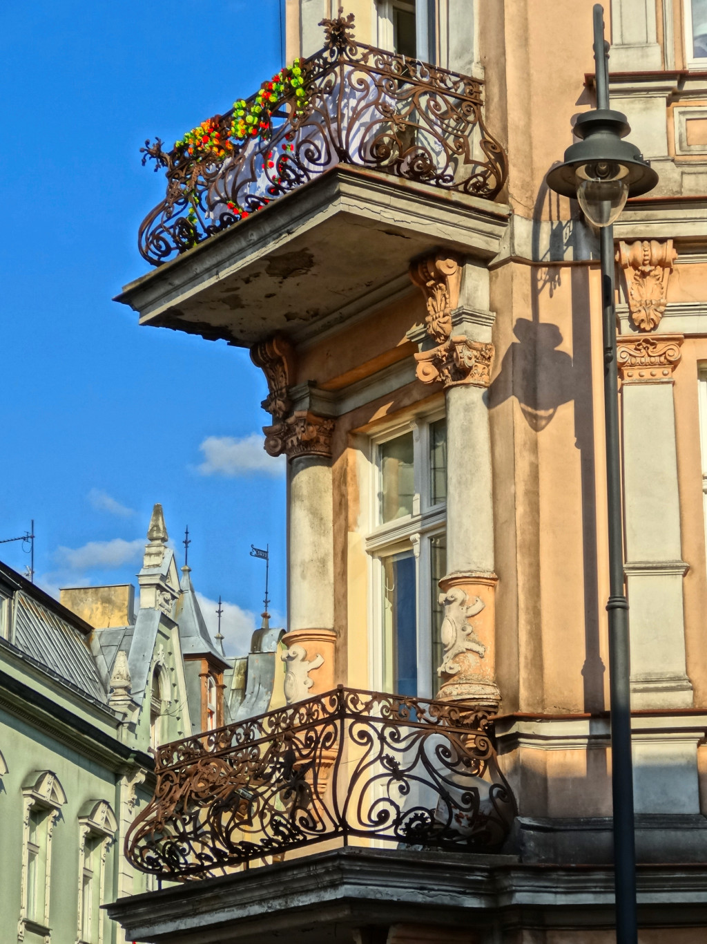 Kamienica przy ul. Cieszkowskiego – Pomorska 48 w Bydgoszczy (1895-1896, Józef Święcicki)